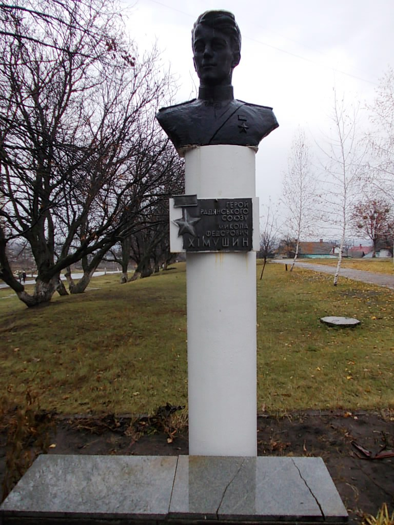 Пам’ятник М. Ф. Хімушіну– Герою Радянського Союзу., Куп'янськ, вул. Харківська